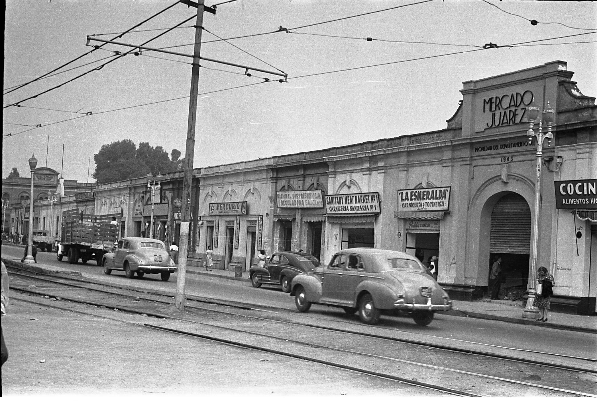 Fotografía antigua de la Ciudad de México resguardadas por el Museo Archivo de la Fotografía (MAF) de la Ciudad de México.